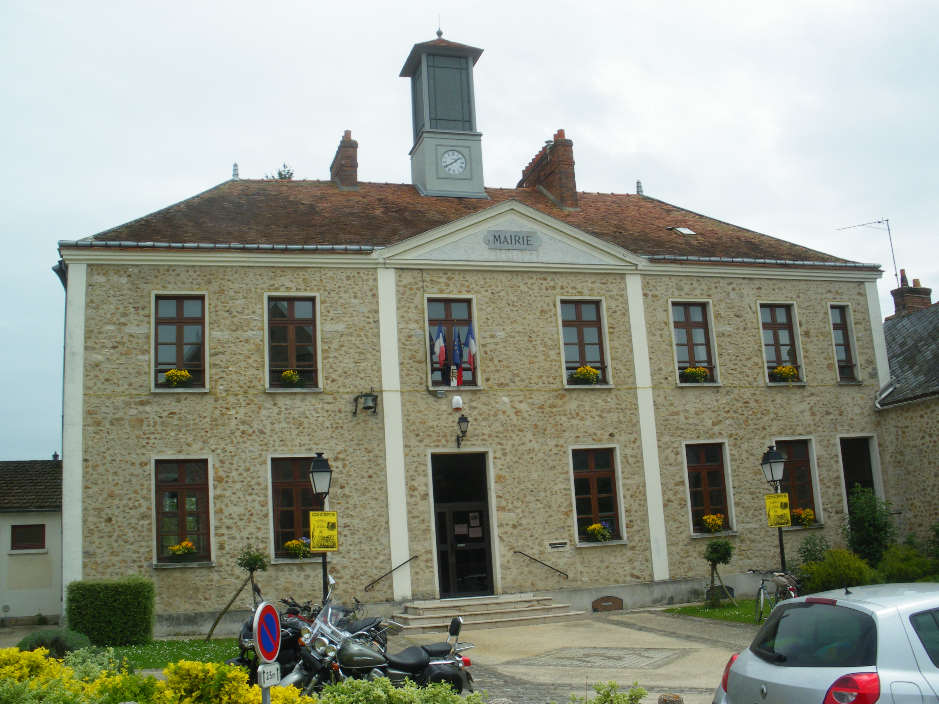 Mairie, Saint Maurice Montcouronne, Essonne, France